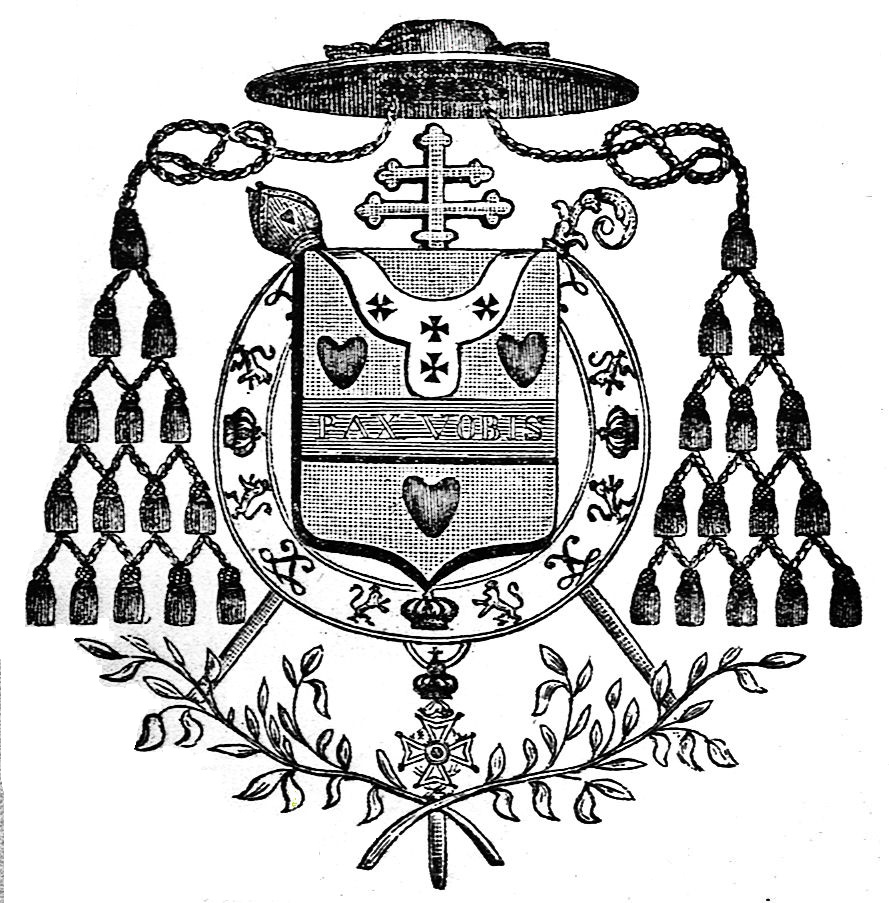 Praenobilis Familia